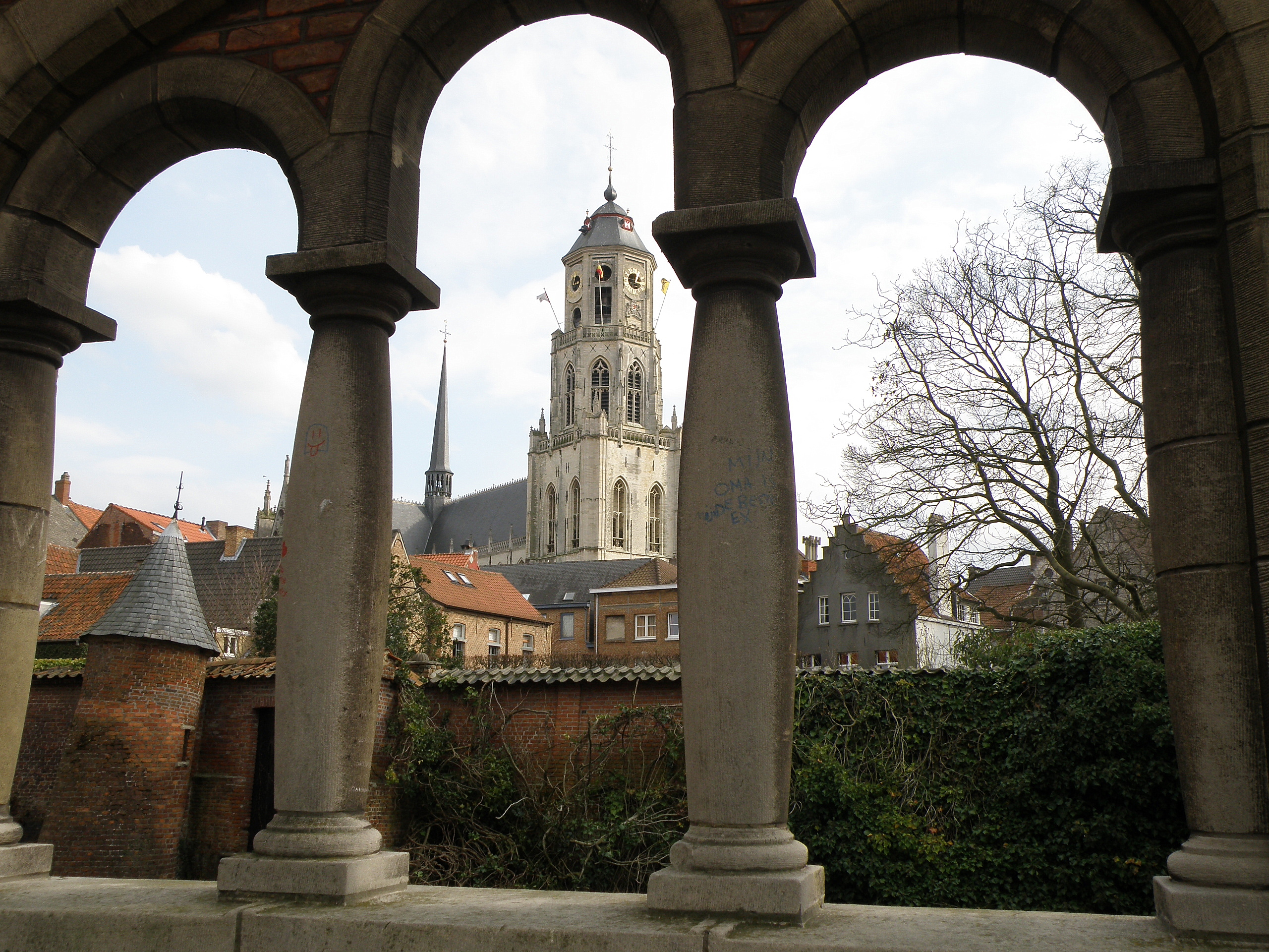 Lier, België. Sint-Gummaruskerk, gezien vanop Vismarkt.